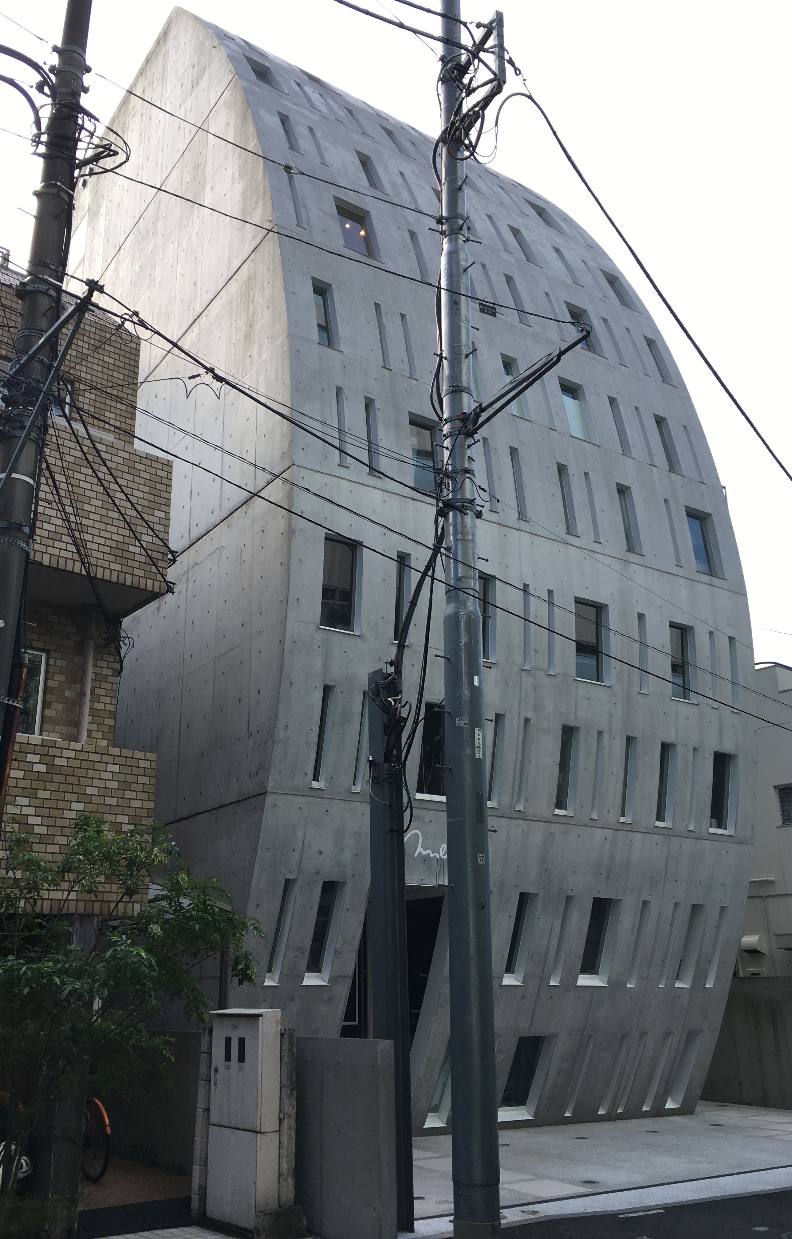 建築家・永山祐子の作品